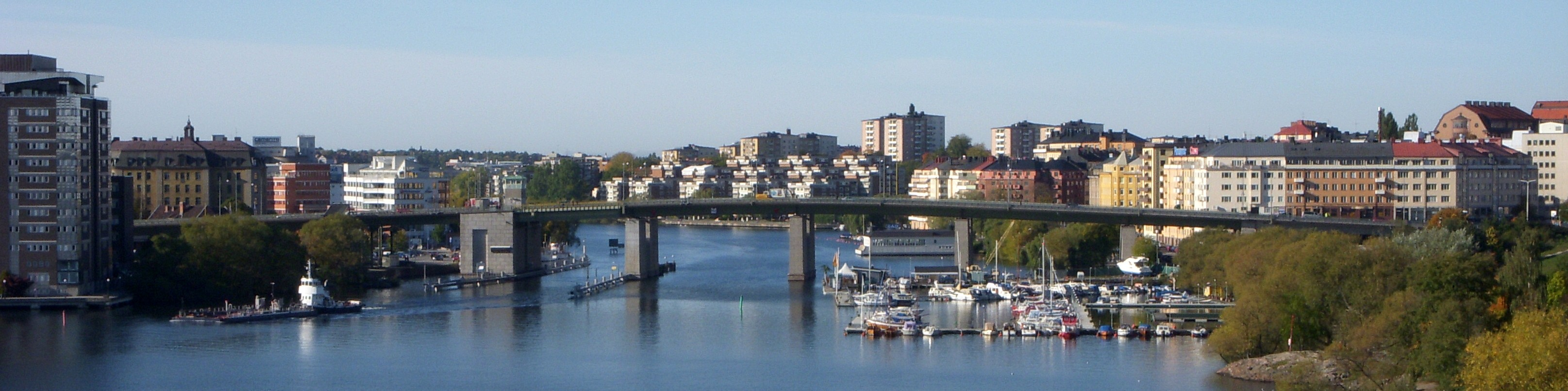 Liljehomsbron i Stockholm sedd från västra Årstabron